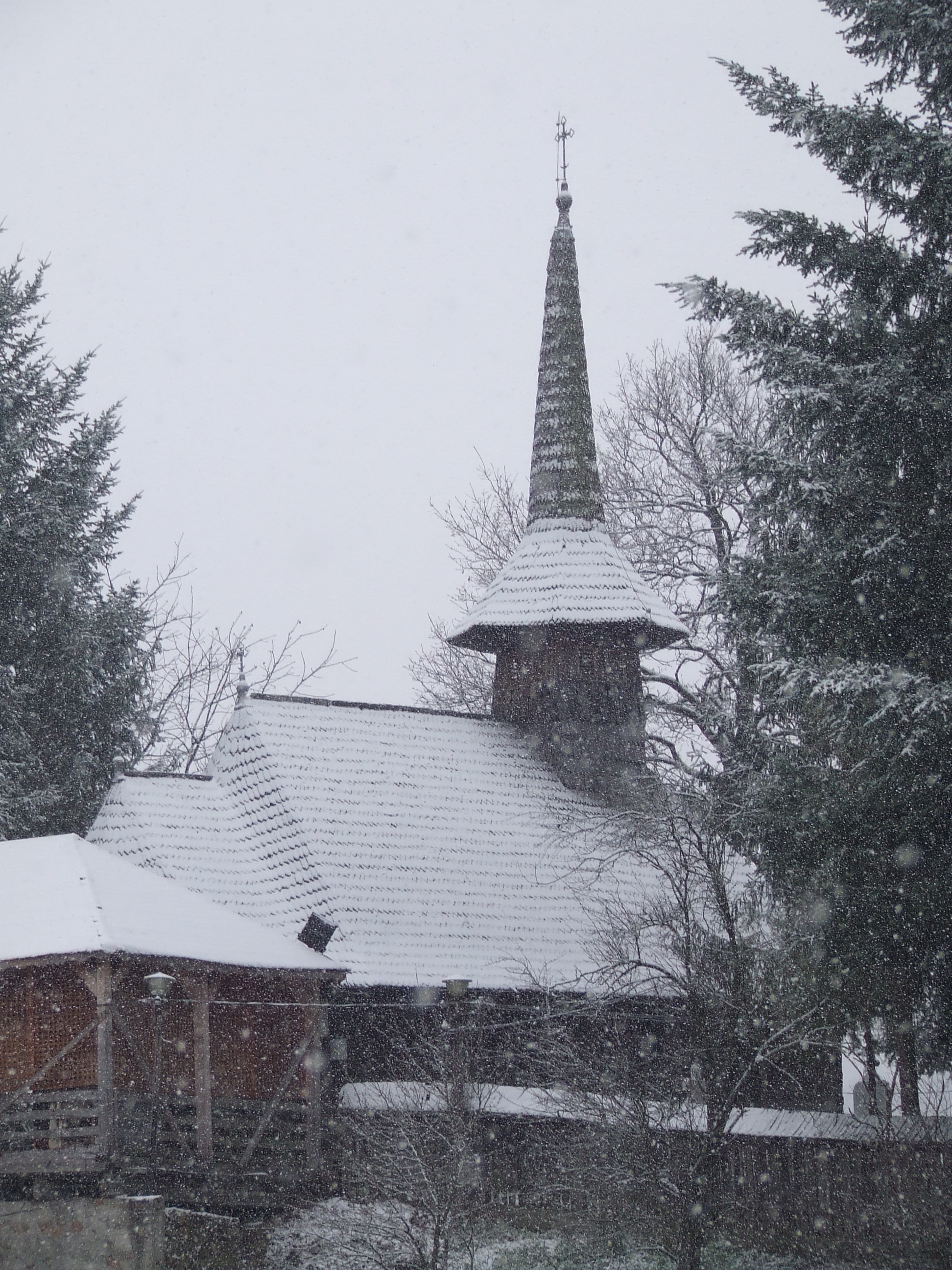 Biserica de lemn din Hidişelu de Jos, judeţul Bihor.